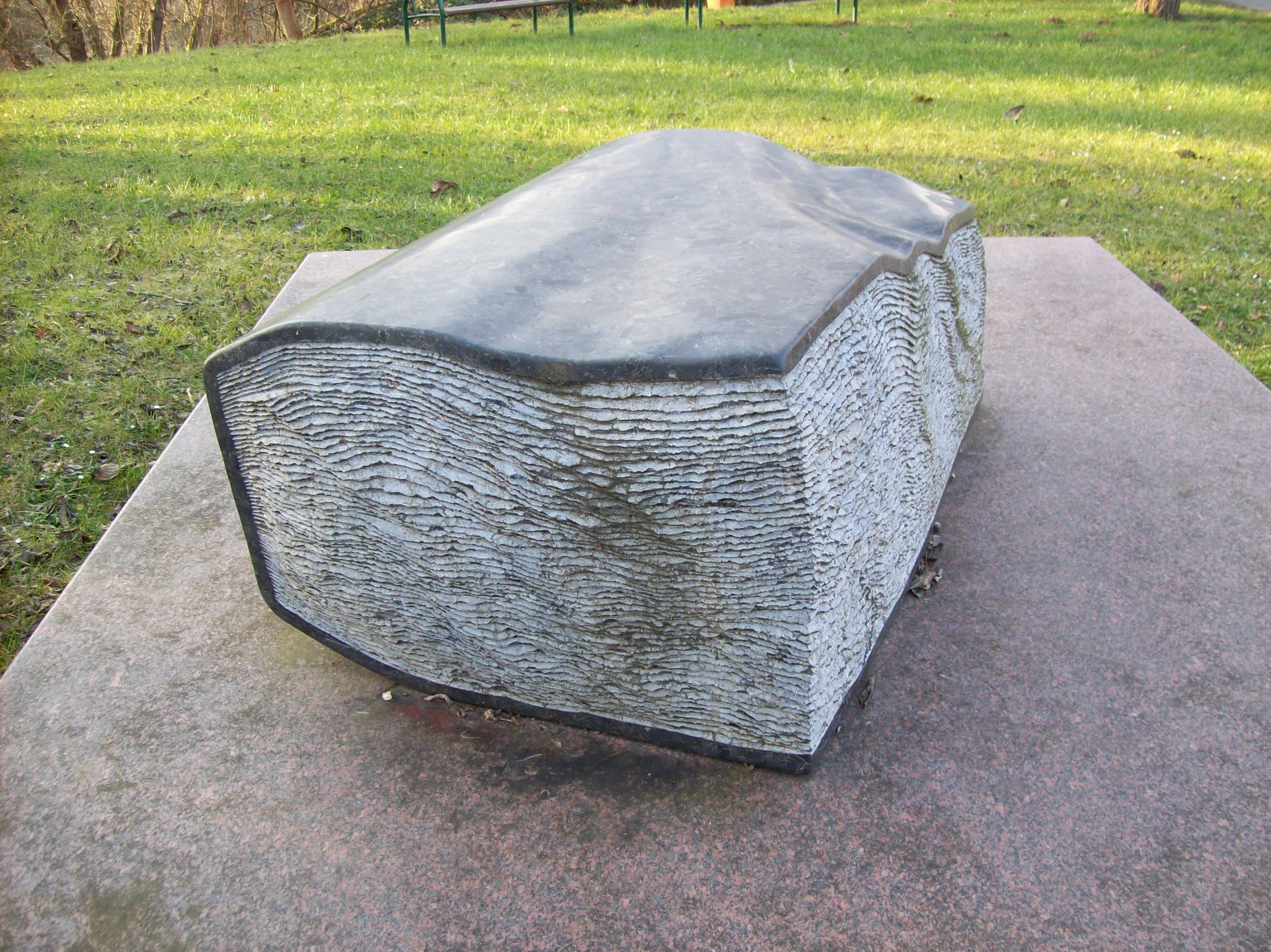 Hommage Ã Tolstoi (2003) Kubach-Willmsen. Standort Bad Münster am Stein